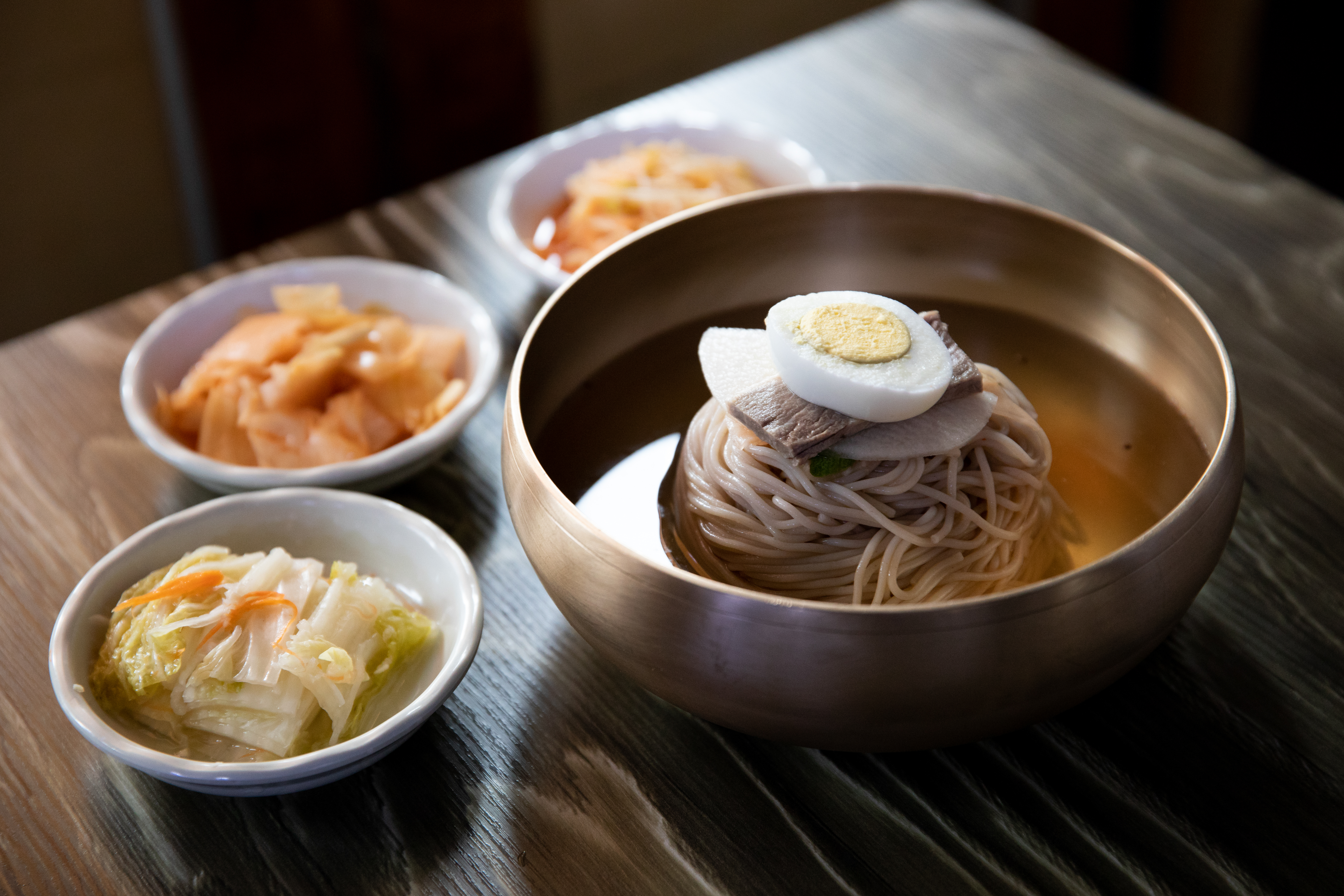 Pyeongyang naengmyeon in Dongmu Bapsang Dongmu Bapsang_ Habjung September 7, 2018 Hapjeong-dong, Mapo-gu, Seoul Ministry of Culture, Sports and Tourism Korean Culture and Information Service ( Official Photographer : Kim Sunjoo This official Republic of Korea photograph is being made available only for publication by news organizations and/or for personal printing by the subject(s) of the photograph. The photograph may not be manipulated in any way. Also, it may not be used in any type of commercial, advertisement, product or promotion that in any way suggests approval or endorsement from the government of the Republic of Korea. 동무밥상 평양냉면 2018-09-07 합정동 동무밥상 문화체육관광부 해외문화홍보원 코리아넷 김순주